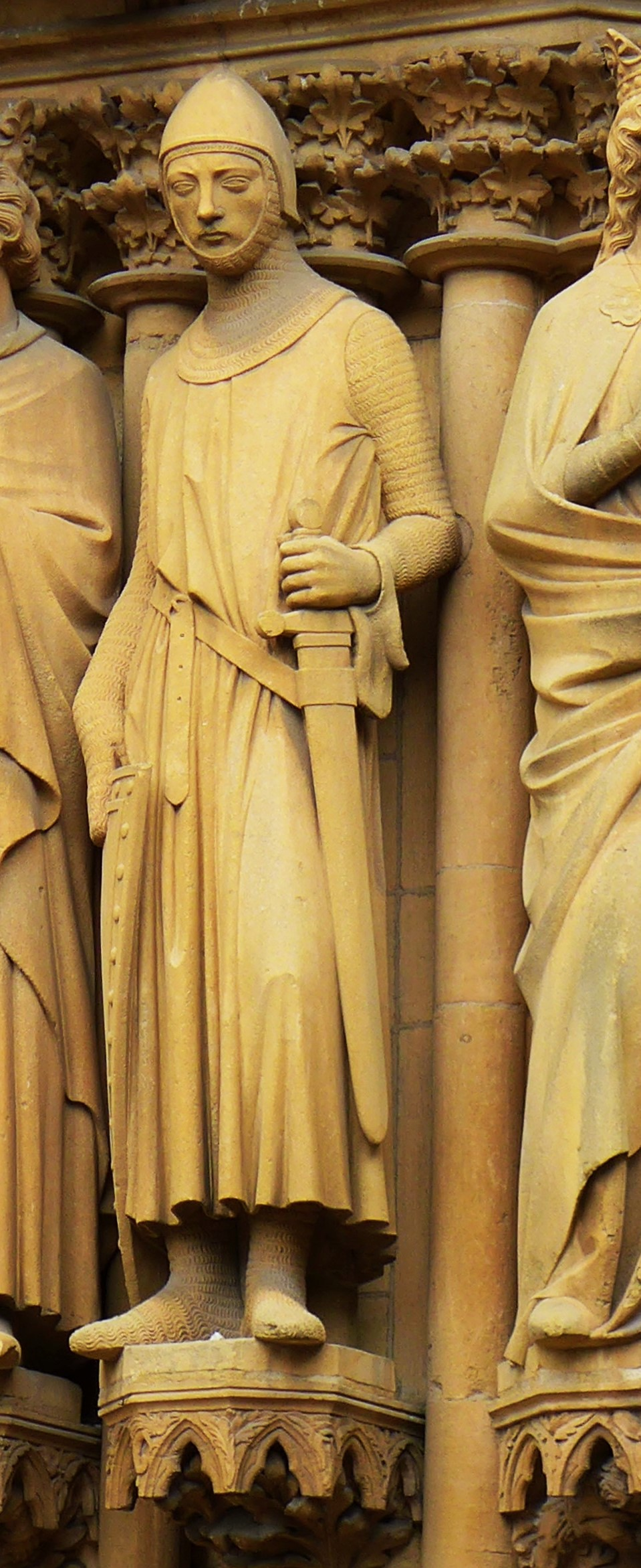 Der heilige Livarius, Bildhauer Auguste Dujardin nach Entwürfen von Conrad Wahn, Segolenakirche Metz